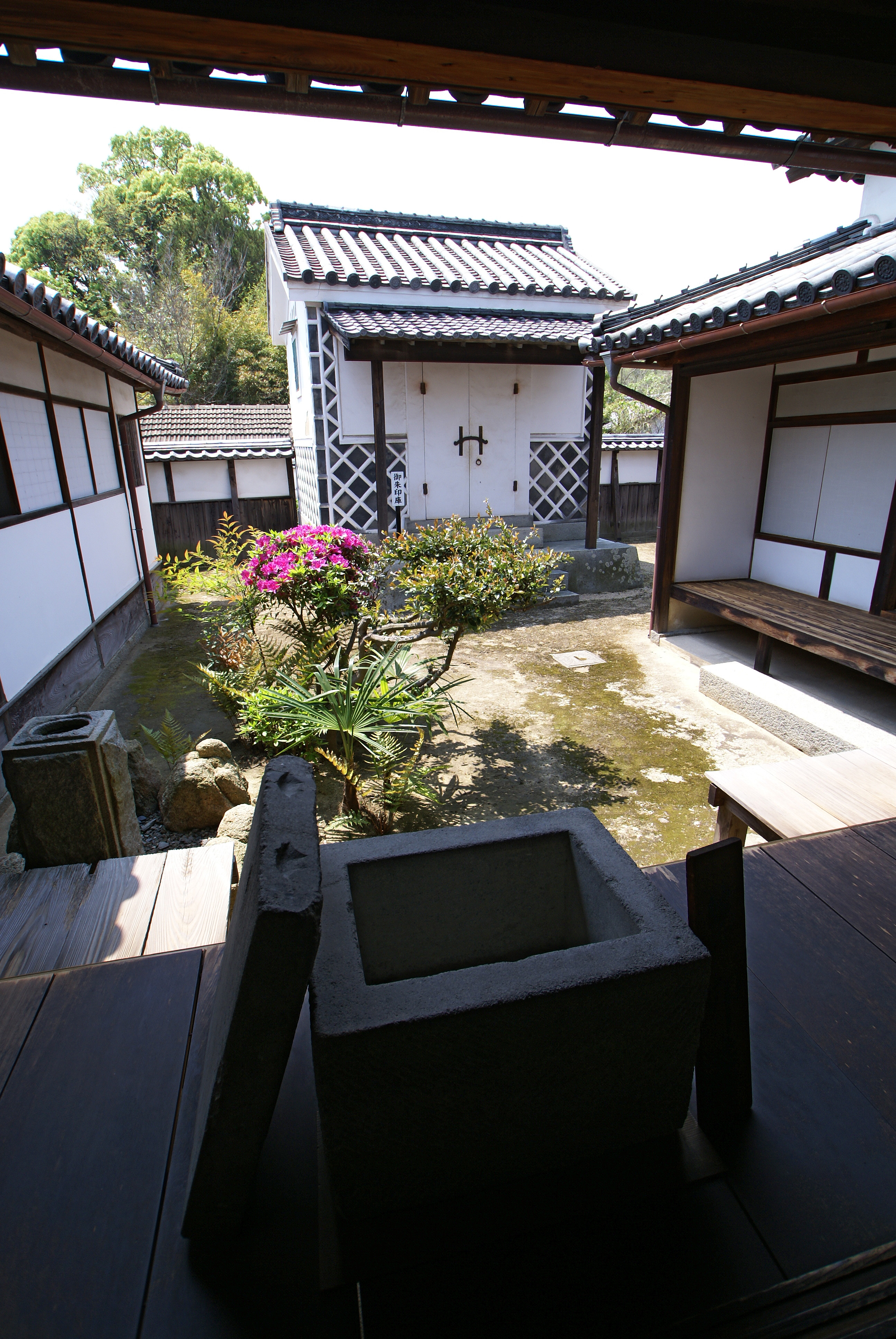 Shiwaku-kinbansho, Hon-jima of Shiwaku Islands (Marugame, Kagawa prefecture, Japan)